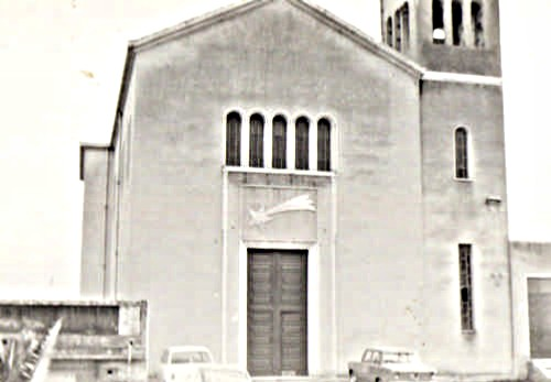 Foto di Santa Maria Assunta Nizza di Sicilia